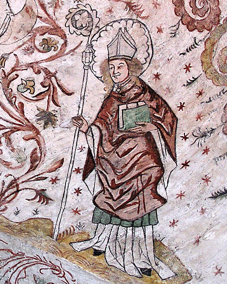 Biskop Overselo